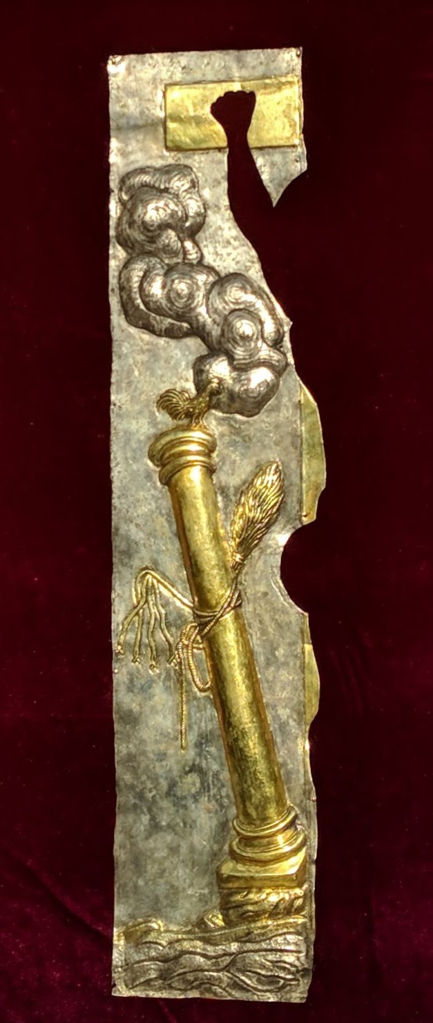 Риза чудотворної ікони Розп'яття Ісуса Христа в Зарваниці. Перша половина XVIII ст.